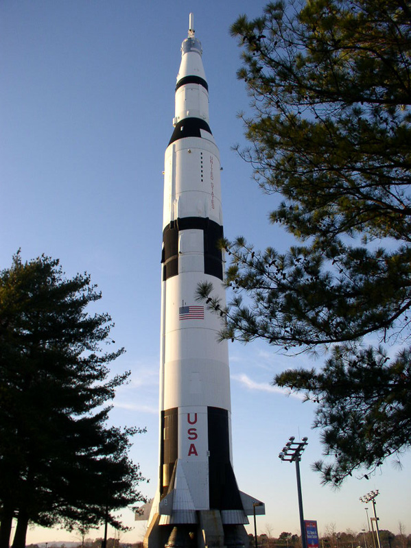 Murali Dhanakoti